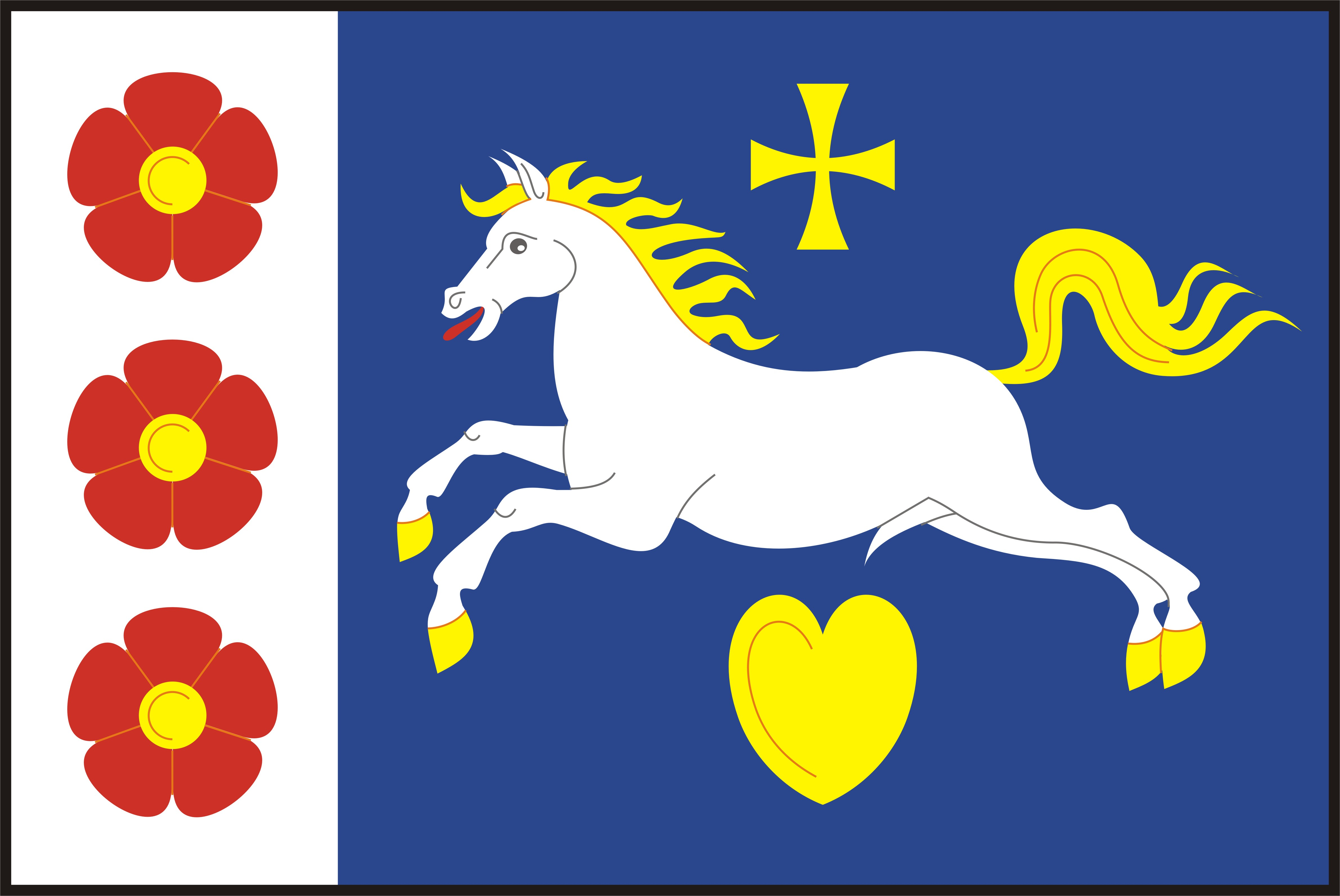 Vlajka obce Oslavice